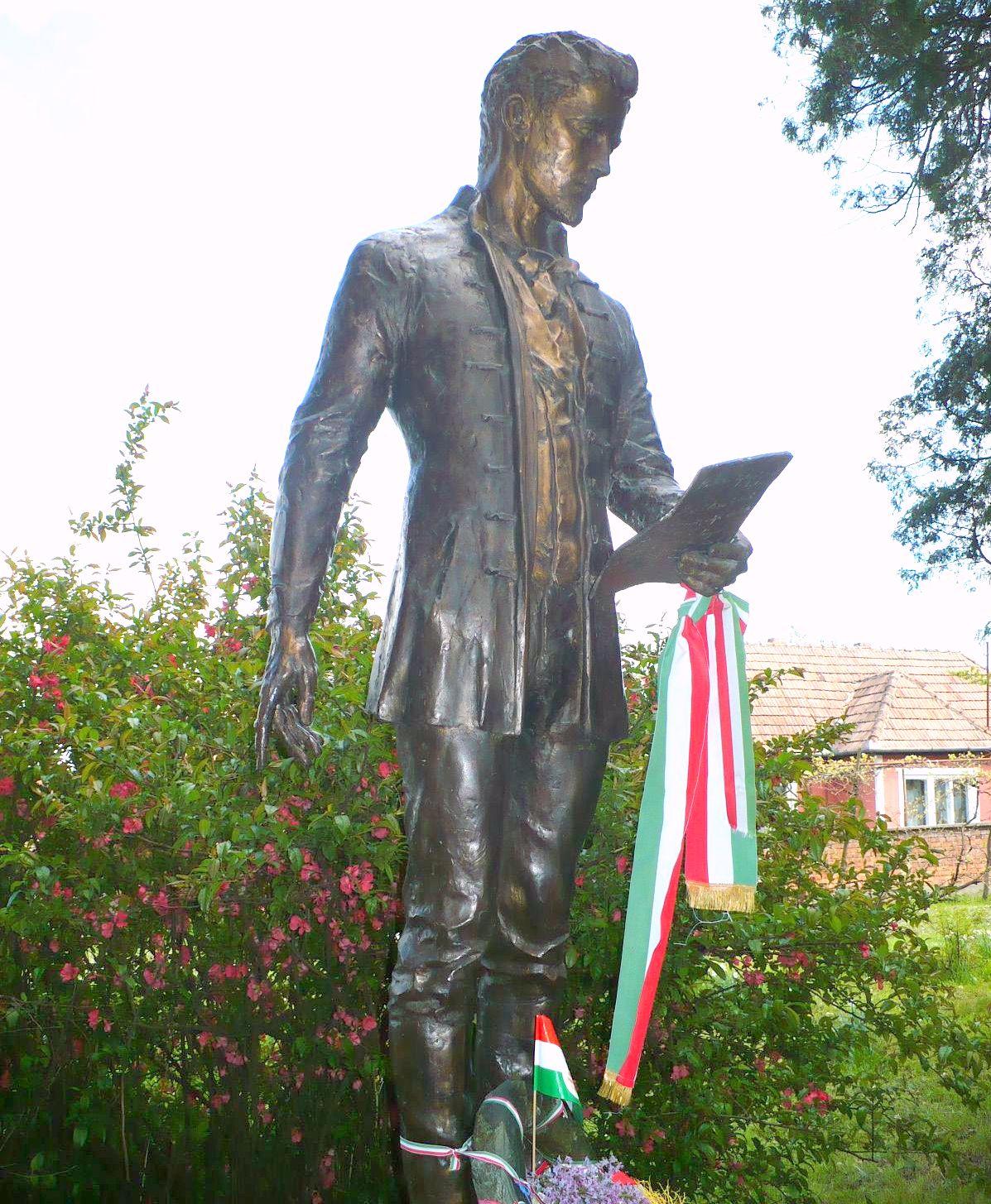 Petőfi Sándor szobra Fehéregyházán a segesvári csata emlékművénél. Máté István szobrászművész alkotása (1999)